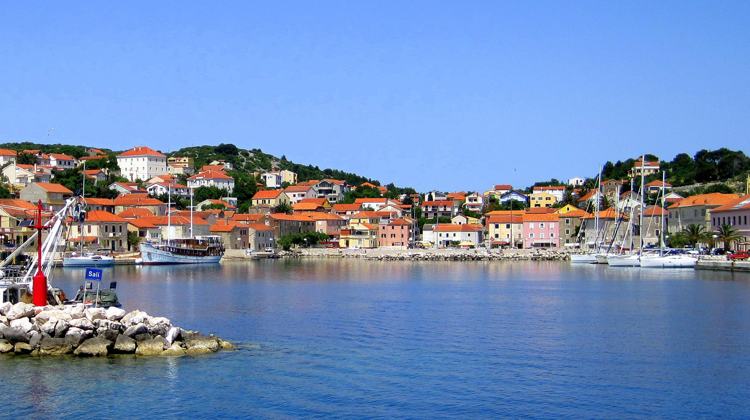 Port de Sali